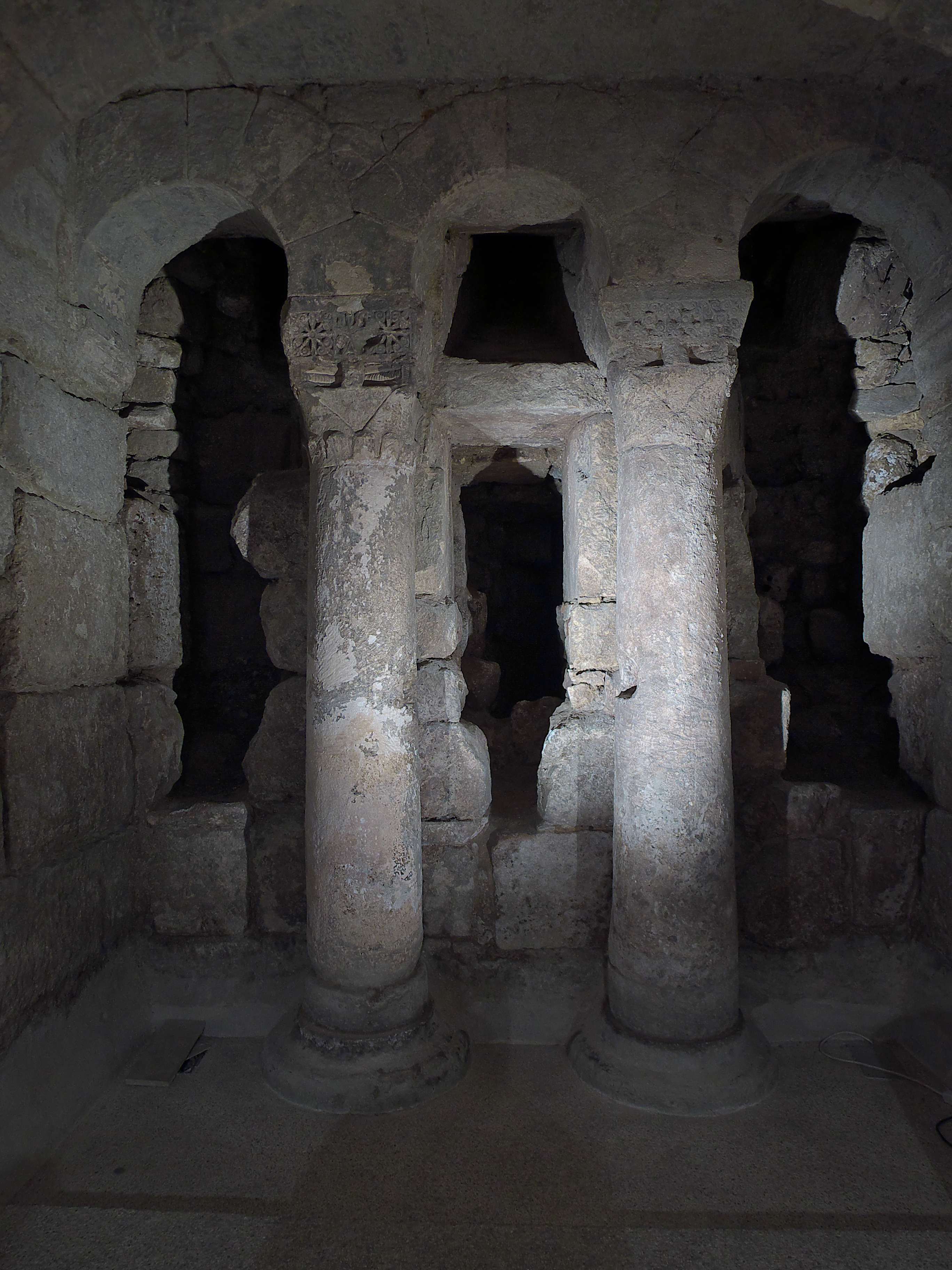 El diácono Antolín de Pamiers (†506) es martirizado y ejecutado en Pamiers. El rey Wamba deposita sus reliquias (672) en este martyrium. (¿Es comparable con el Martyrium de La Alberca?). Es el comienzo de la basílica visigoda y de la Catedral de San Antolín de Palencia.